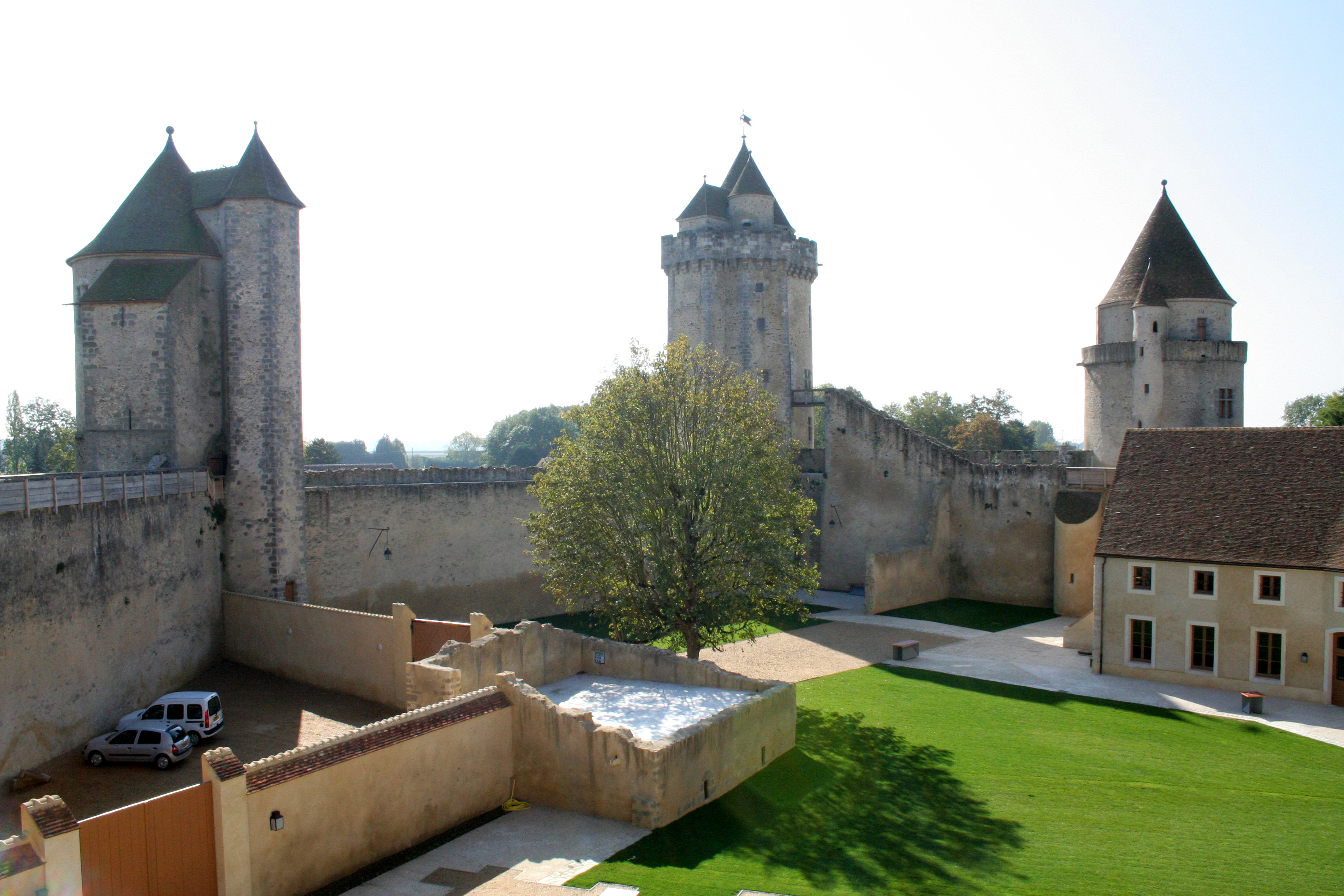 Blandy-lès-Tours (Seine-et-Marne), château, vue générale de la cour.